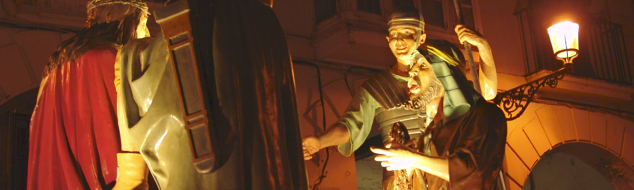 Detalle paso Coronación de Espinas, parroquia de San Lorenzo, Semana Santa 2008, Burgos (España).